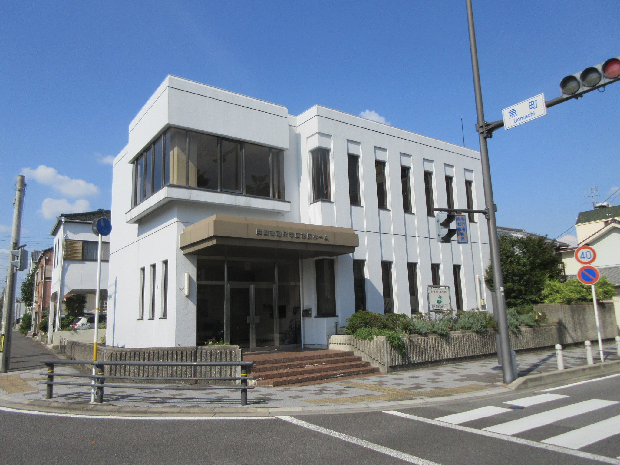 岡崎市連尺学区市民ホーム（岡崎市魚町）